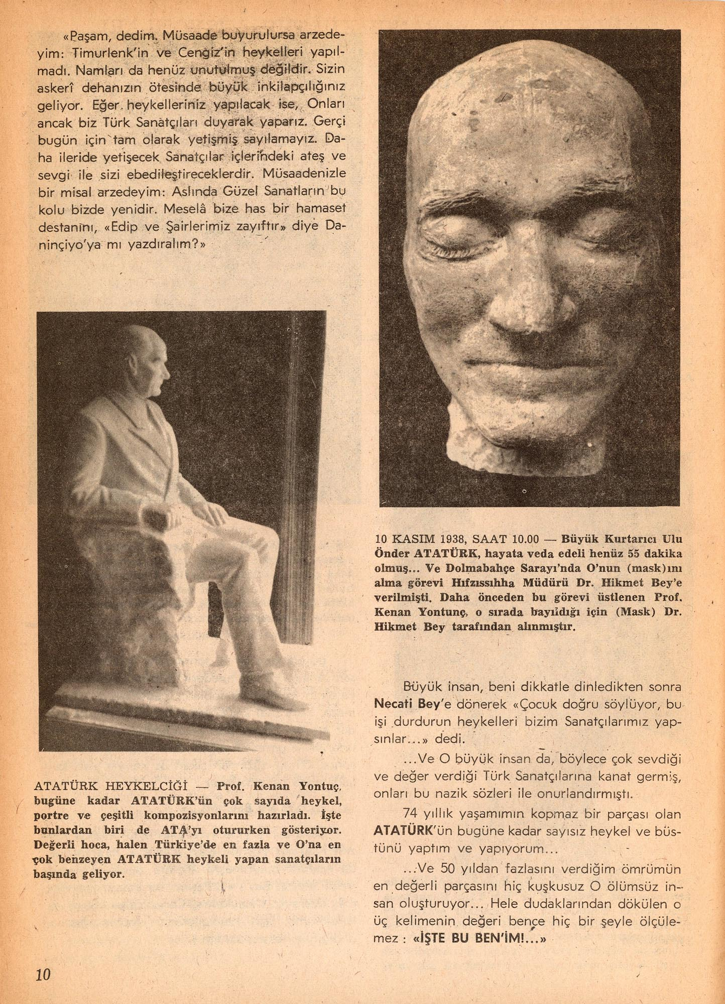 Atatürk’ün sağlığındaki ilk büstü, dönemin Seyr-i Sefain (Deniz Yolları) İdaresi Genel Müdürü Sadullah Güney’in teklifiyle 1926’da heykeltıraş Kenan Ali Yontunç’a yaptırılarak yolcu salonunun önüne yerleştirildi. Güney, idaredeki görevinin yanı sıra 1929’da, Atatürk’ün talimatıyla Yalova Termal Kaplıcaları’nın modern bir tesis olarak hizmete açılması görevini üstlendi. Tophane’de bulunan Seyr-i Sefain İdaresi’nin 1933’te lağvedilmesinin ardından buradan taşınan büst, 1967’de Denizcilik Bankası Denizyolları İşletmesi tarafından kaplıcalara hediye edildi. Öte yandan; bir dönem Yontunç’la çalışmış olan Alman heykeltıraş Her Gros 1931’de, Türkiye’nin çeşitli bölgelerinde Yontunç imzasıyla sergilenen kimi eserlerin kendisine ait olduğunu iddia etti. 23 Temmuz 1931 tarihli “Son Posta” gazetesinde, heykeltıraş Sabiha Ziya’nın, bu iddiaların gerçek olduğunu belirten bir yazısı yayımlandı. Gros’un şahit gösterdiği Esnaf Bankası Müdürü Faik Bey ise, ilerleyen günlerde “Vakit” gazetesine verdiği demeçte Alman heykeltıraşı tanımadığını ifade ederek söz konusu haberleri yalanladı. “Sanat Çevresi”, Sayı: 1, Kasım 1978